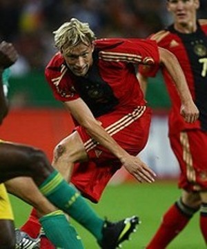 Simon Rolfes. Photo by Tsutomu Takasu